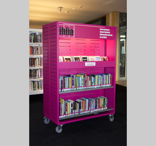 Roze Kast op het IHLIA-plein in de Openbare Bibliotheek Amsterdam. Deze bevat uitleenbare boeken, dvd's enzovoorts uit de OBA met een LBGT-aspect.